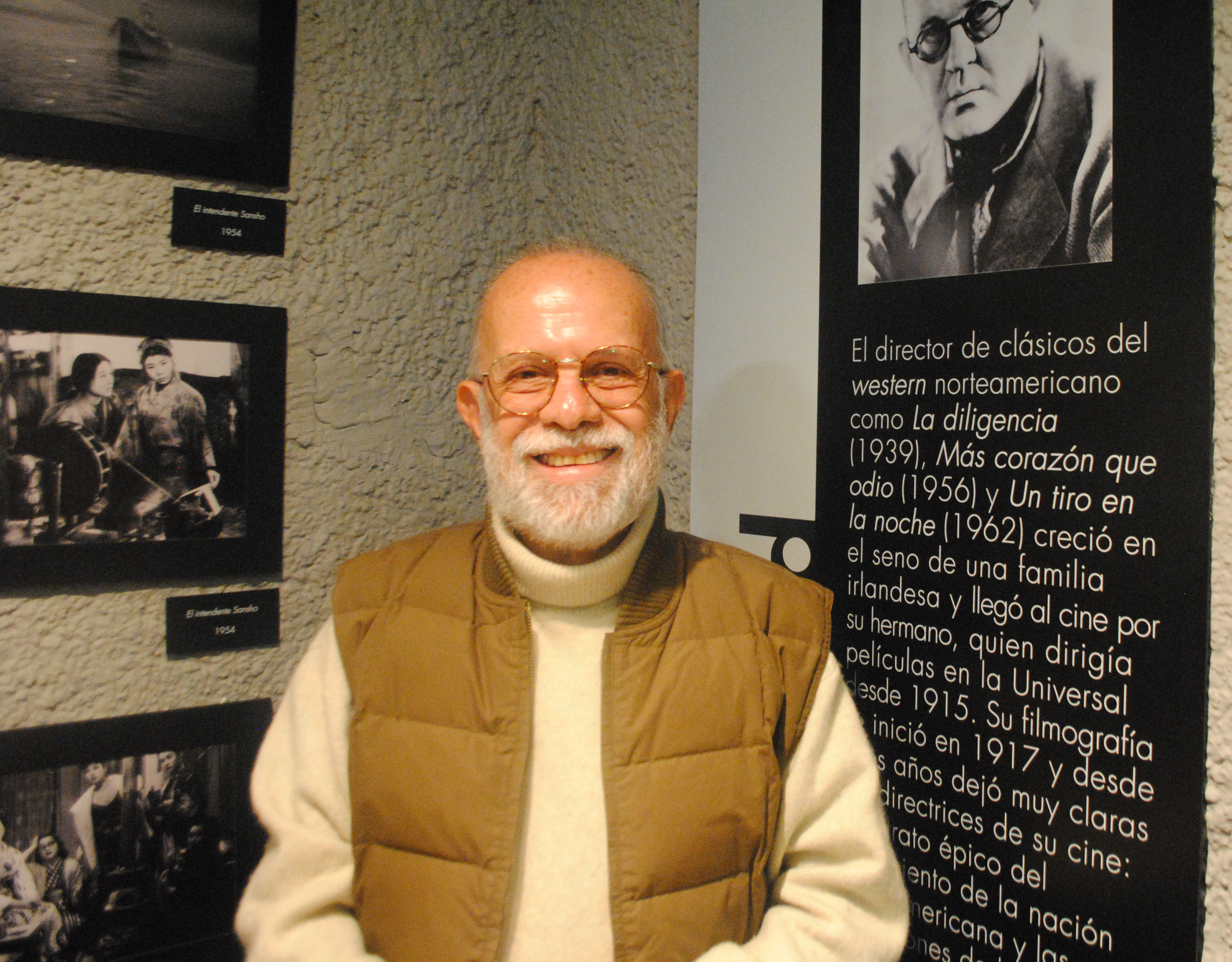 El director de cine Jaime Humberto Hermosillo. Foto tomada durante el editatón Wikipedia ama el cine, Cineteca Nacional, Ciudad de México.